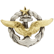 Qualification de pilote de l'aéronavale.